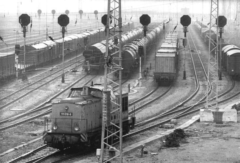 Rostock, Güterbahnhof ADN-ZB Sindermann 18.4.1986 Rostock: Computer für Güterbahnhof. Bis zu 80 Züge fahren täglich in den Bahnhof Rostock-Seehafen ein. Rund 2.000 Waggons müssen dort innerhalb von 24 Stunden erfaßt und rangiert werden. Mit Hilfe von Bürocomputern können ankommende Güterwagen jetzt rascher registriert und zum Be- und Entladen bereitgestellt werden. Bis zum kommenden Jahr soll eine Computerlösung für ausfahrende Züge das Projekt ergänzen. - Siehe auch Foto 1986-0418-1n